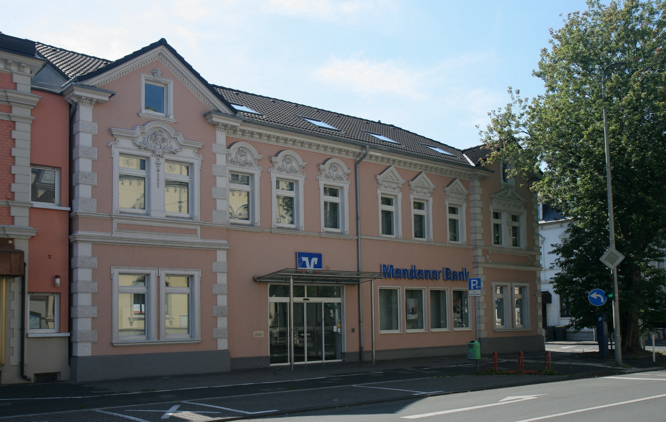 Doppelhaus, Unnaer Straße 27/29 in Menden (Sauerland). This image shows a heritage building in Germany, located in the North Rhine-Westphalian city Menden (Sauerland) (no. 92).